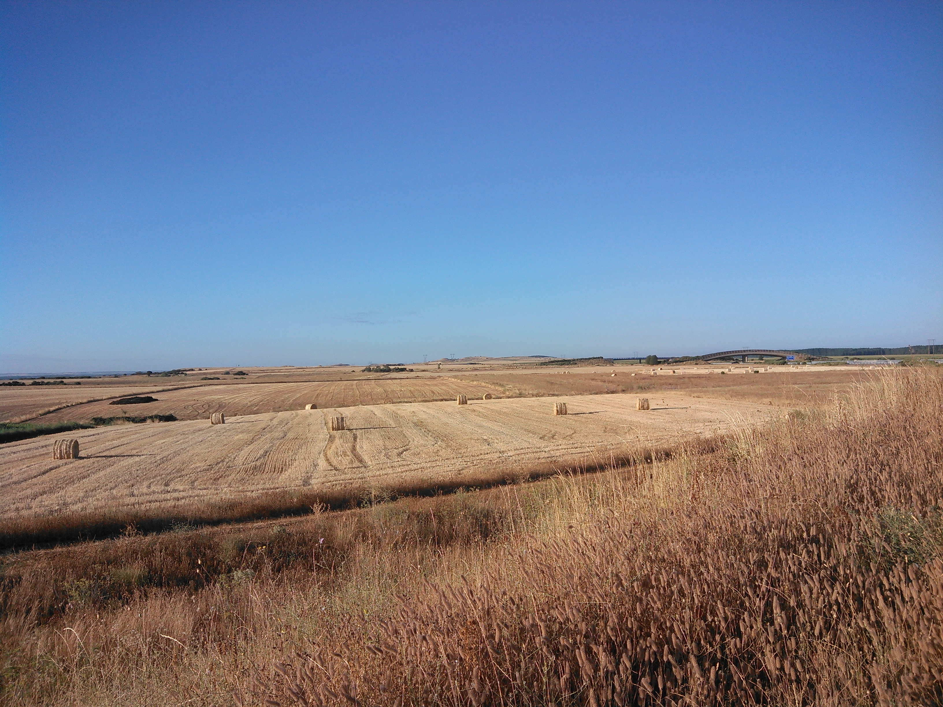 Tierras de secano de los términos municipales de Villademor de la Vega y Toral de los Guzmanes, junto a la autovía A-66, en España. A la derecha se puede apreciar un ecoducto para el paso de la fauna salvaje campo a través.